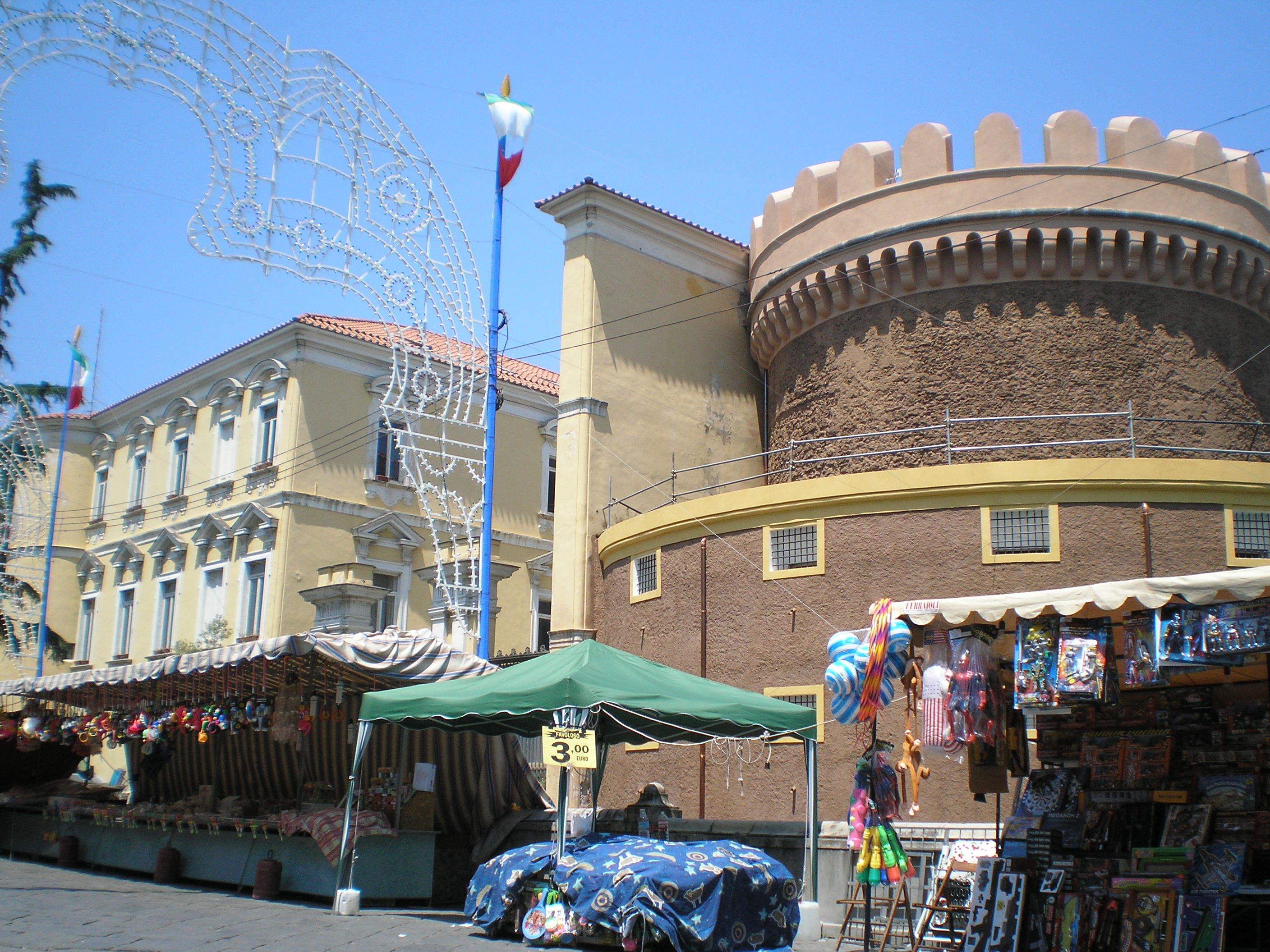 Castello Doria (foto Peppe Pepe di Angri)